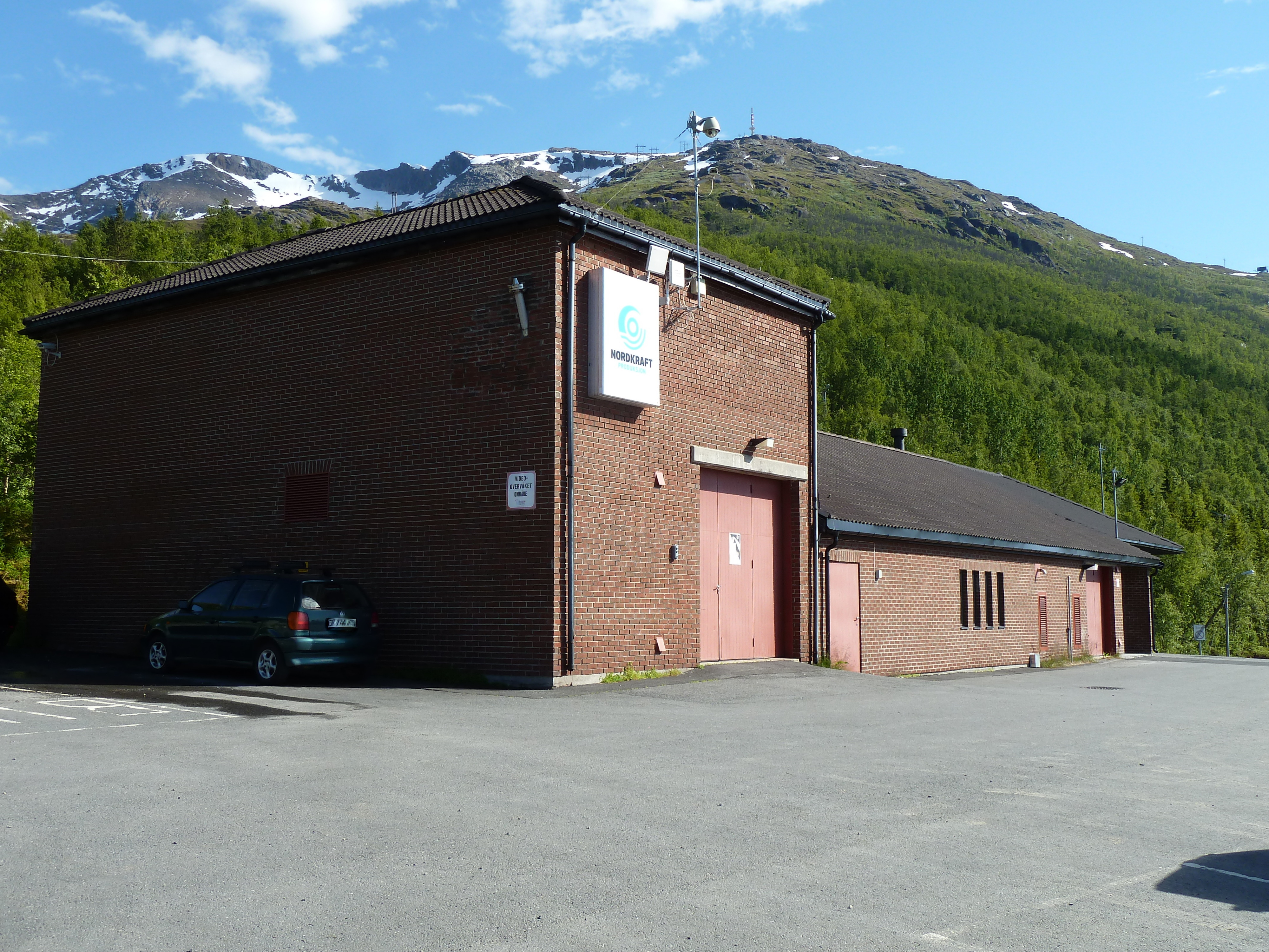 Taraldsvik kraftverk i Narvik. Hovedbygningen.